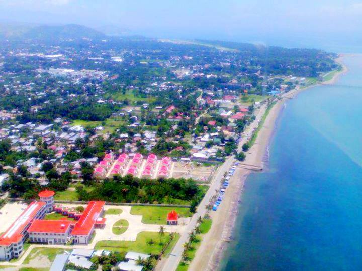 Dili